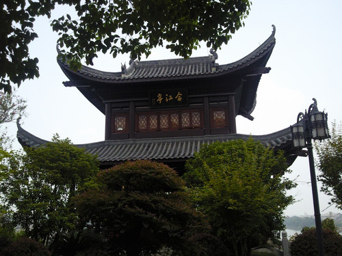 书院建筑物